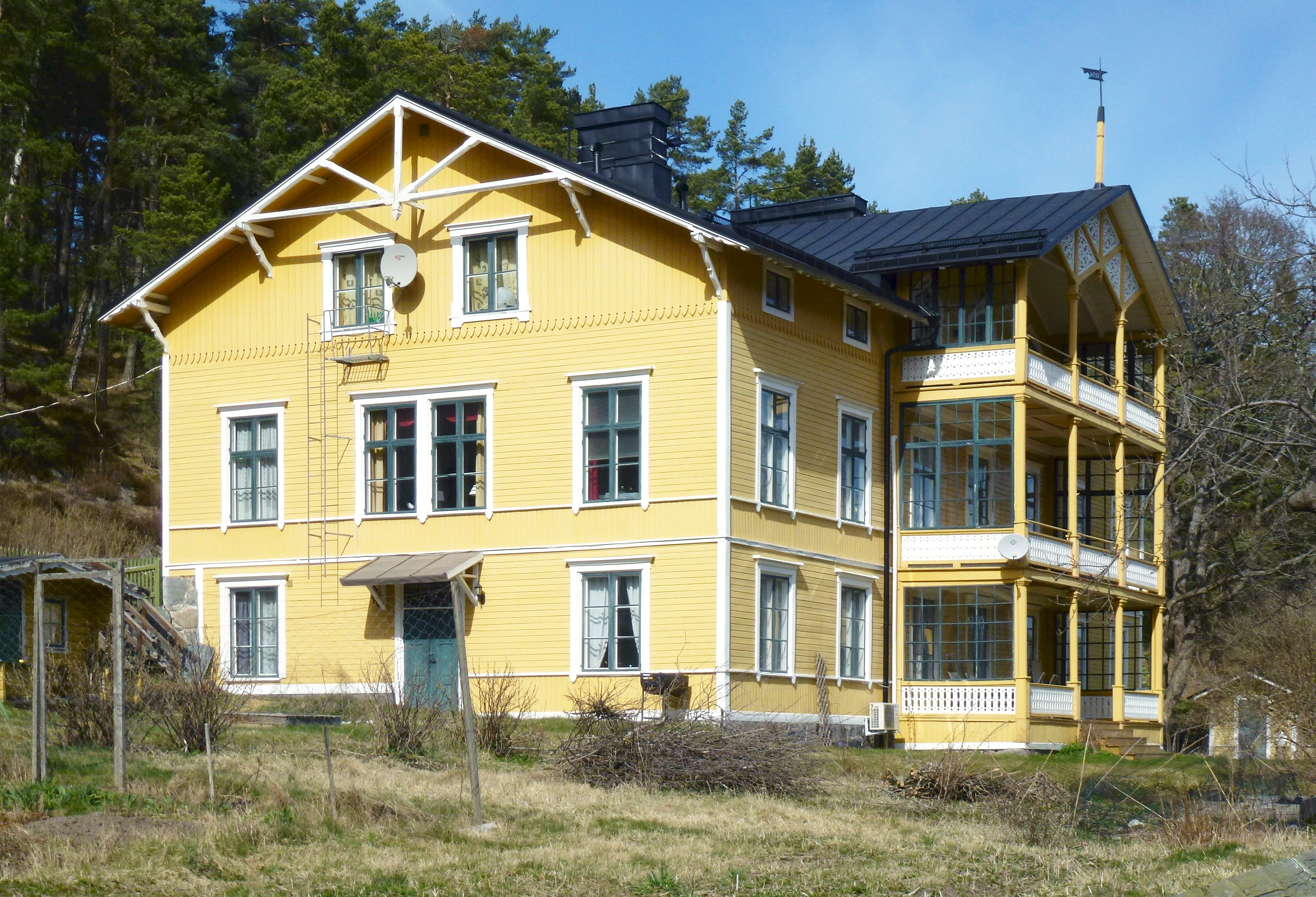 Nacka gård huvudbyggnad